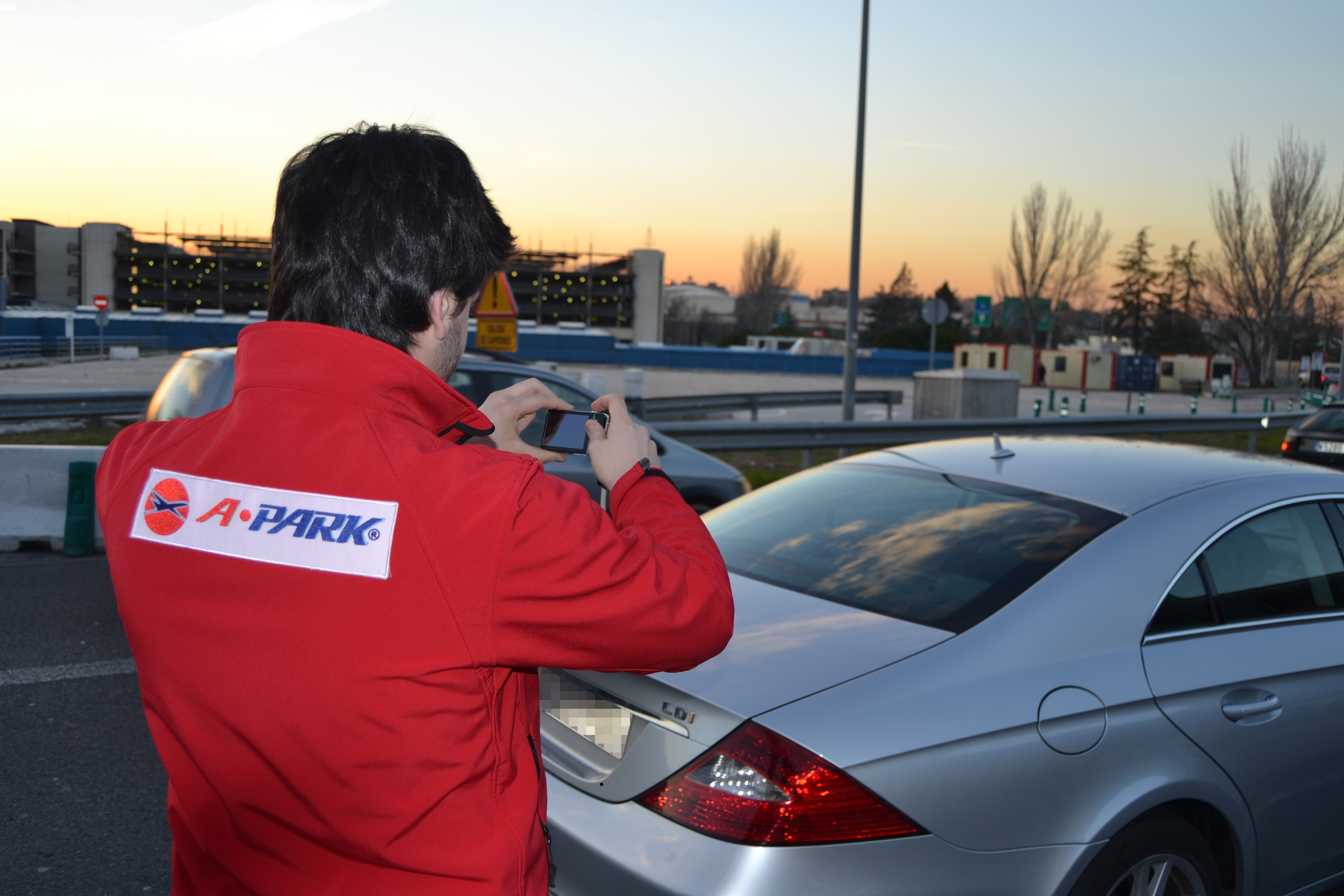 Trabajador de la empresa Airpark Aparcacoches realizando fotografías preventivas a un vehículo.